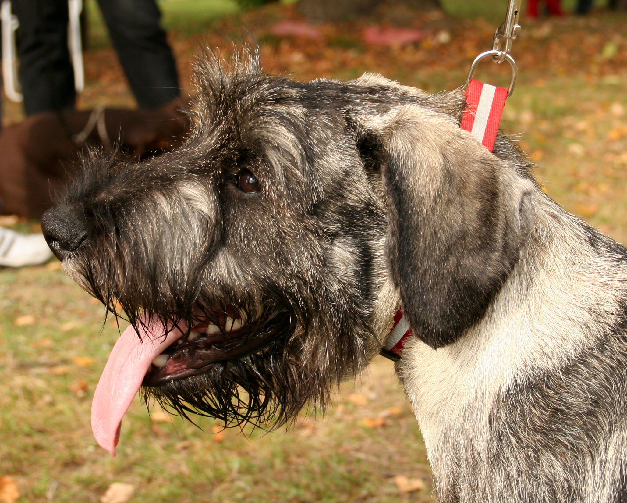 Głowa sznaucera średniego o umaszczeniu pieprz i sól podczas krajowej wystawy w Rybniku - Kamieniu.